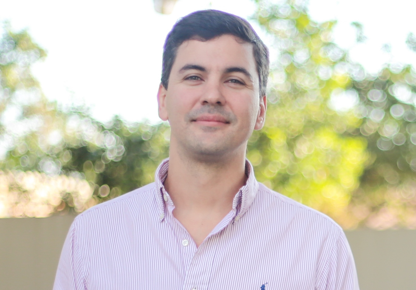 Santi Peña en 2017